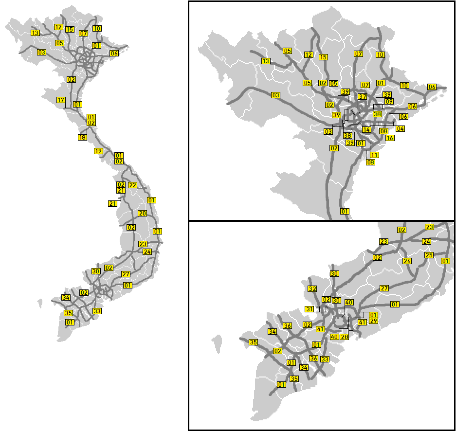 نقشه آزادراه های در برنامه جمهوری سوسیالیستی ویتنام به همراه شماره هر مسیر